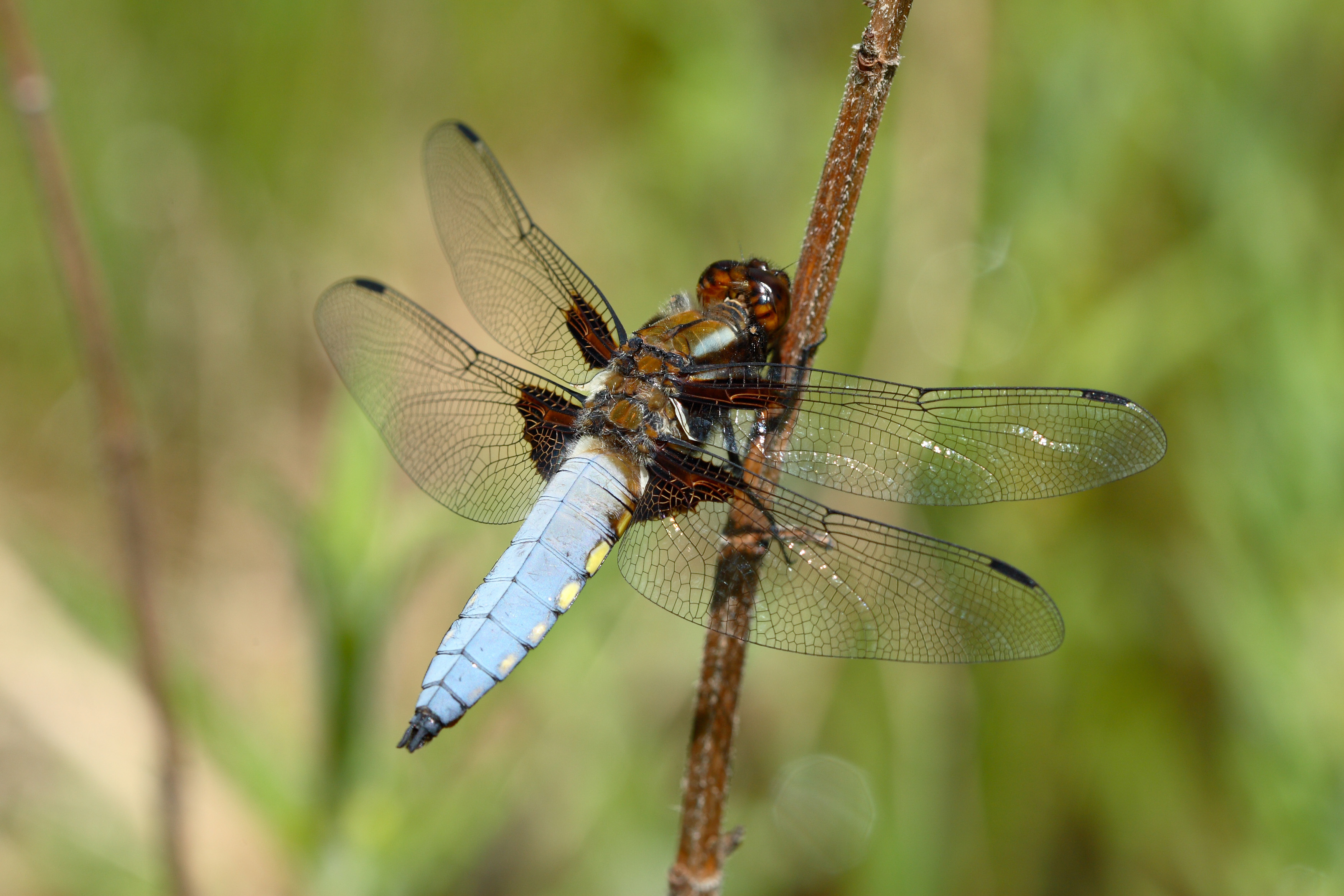 Plattbauch (Libellula depressa)